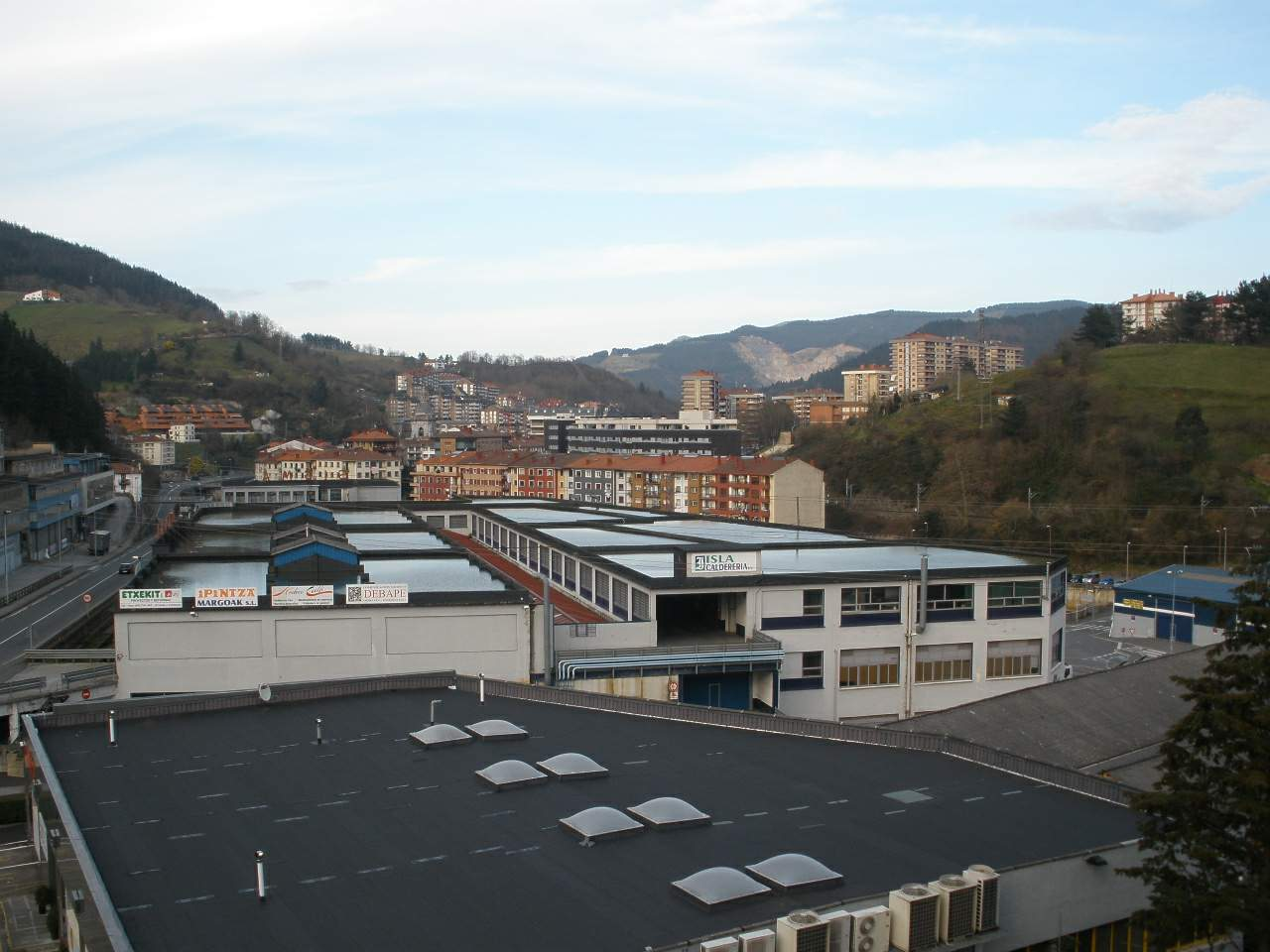 Elgoibar (Gipuzkoa)